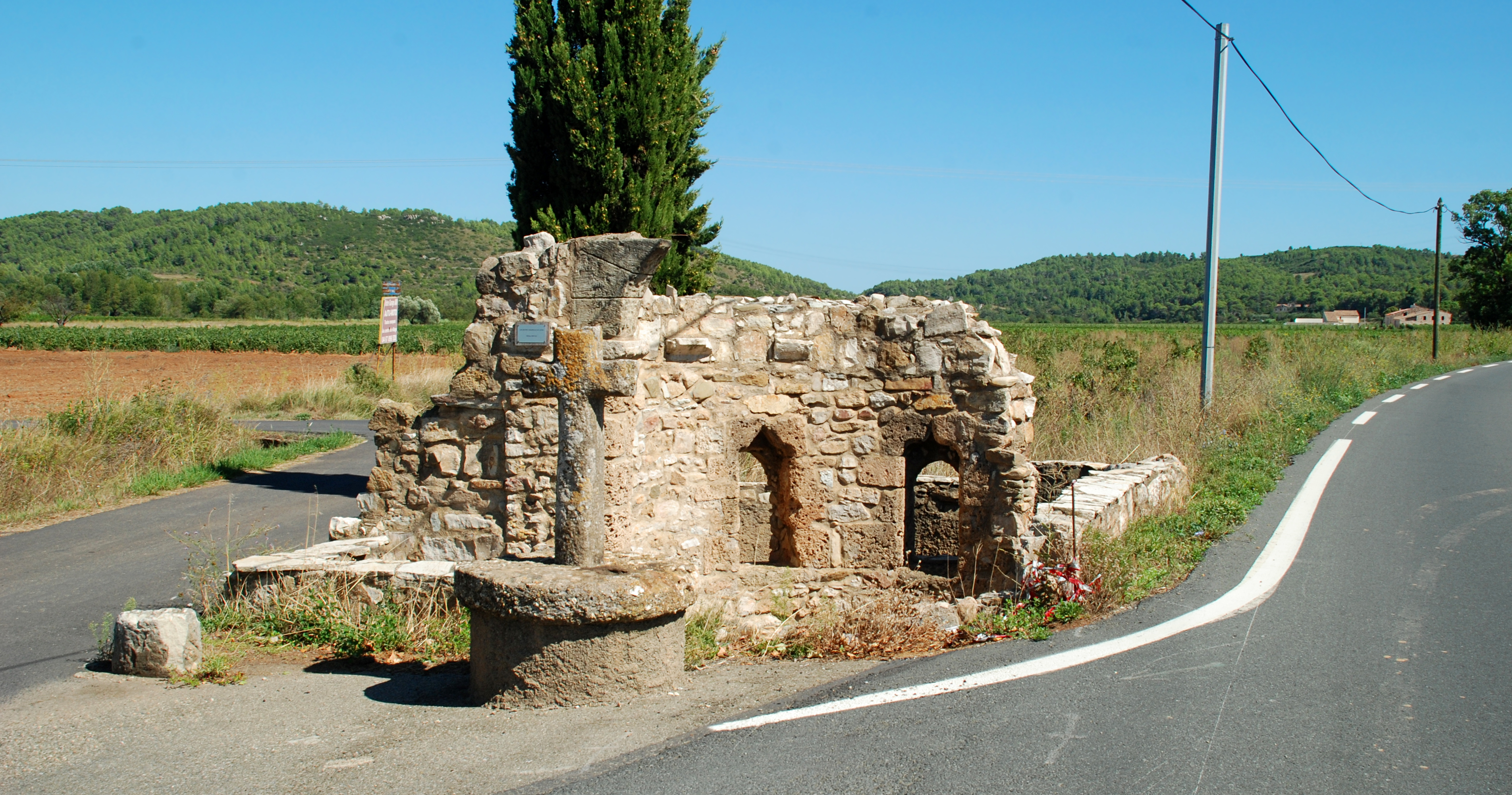 France - Languedoc - Hérault - Cessenon-sur-Orb - Chapelle Sainte-Anne